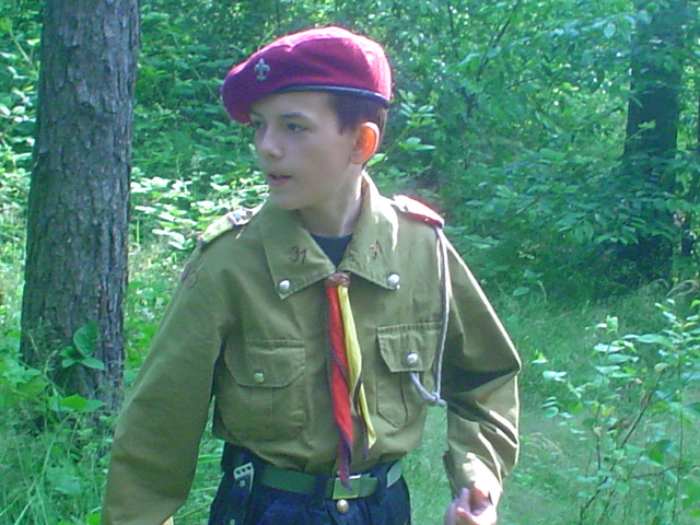 Członek OHR w pełnym umundurowaniu